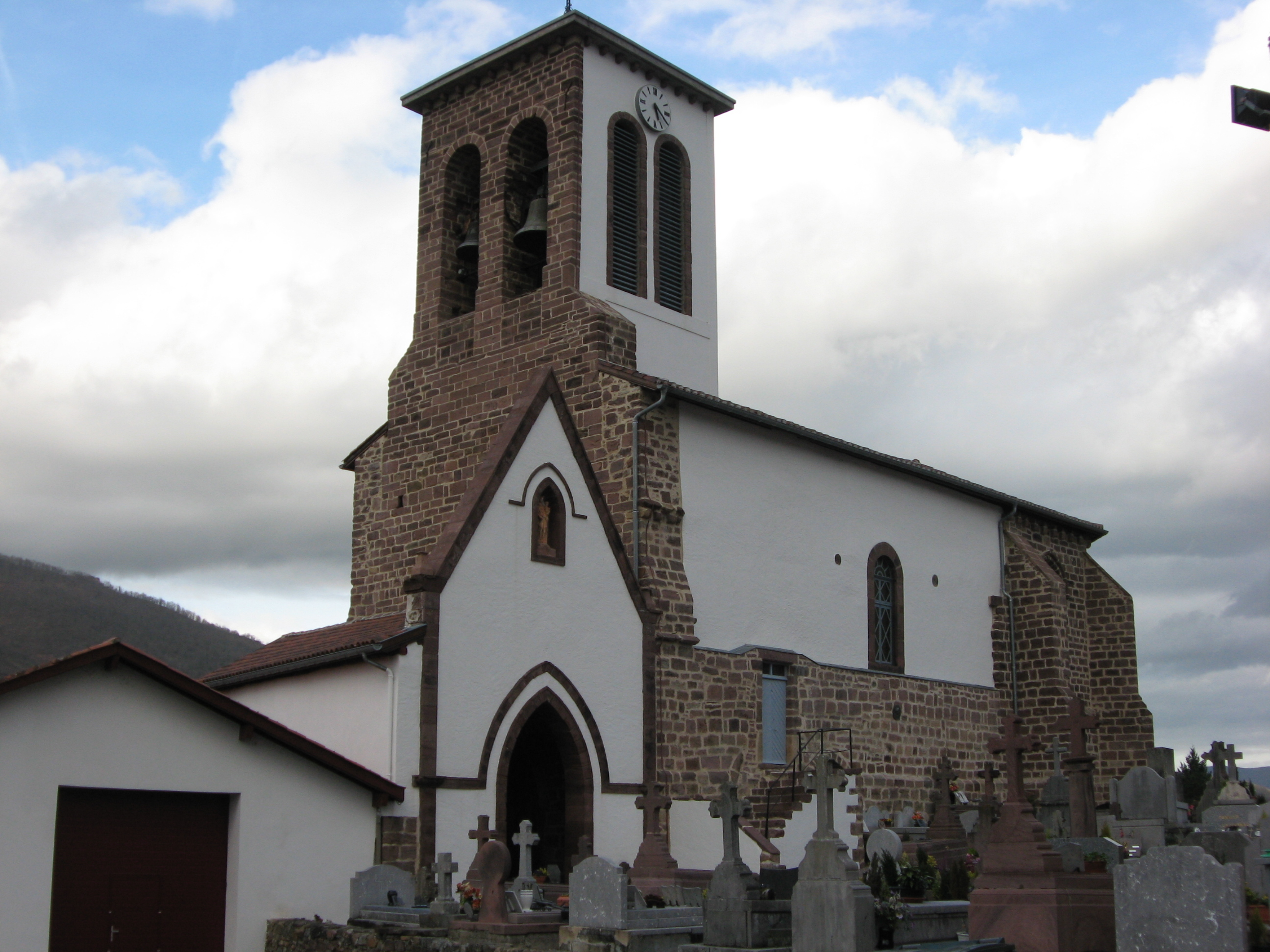 Eglise d'Uhart-Cize (Basse-Navarre) (Pyrénées-Atlantiques) (Pyrénées).